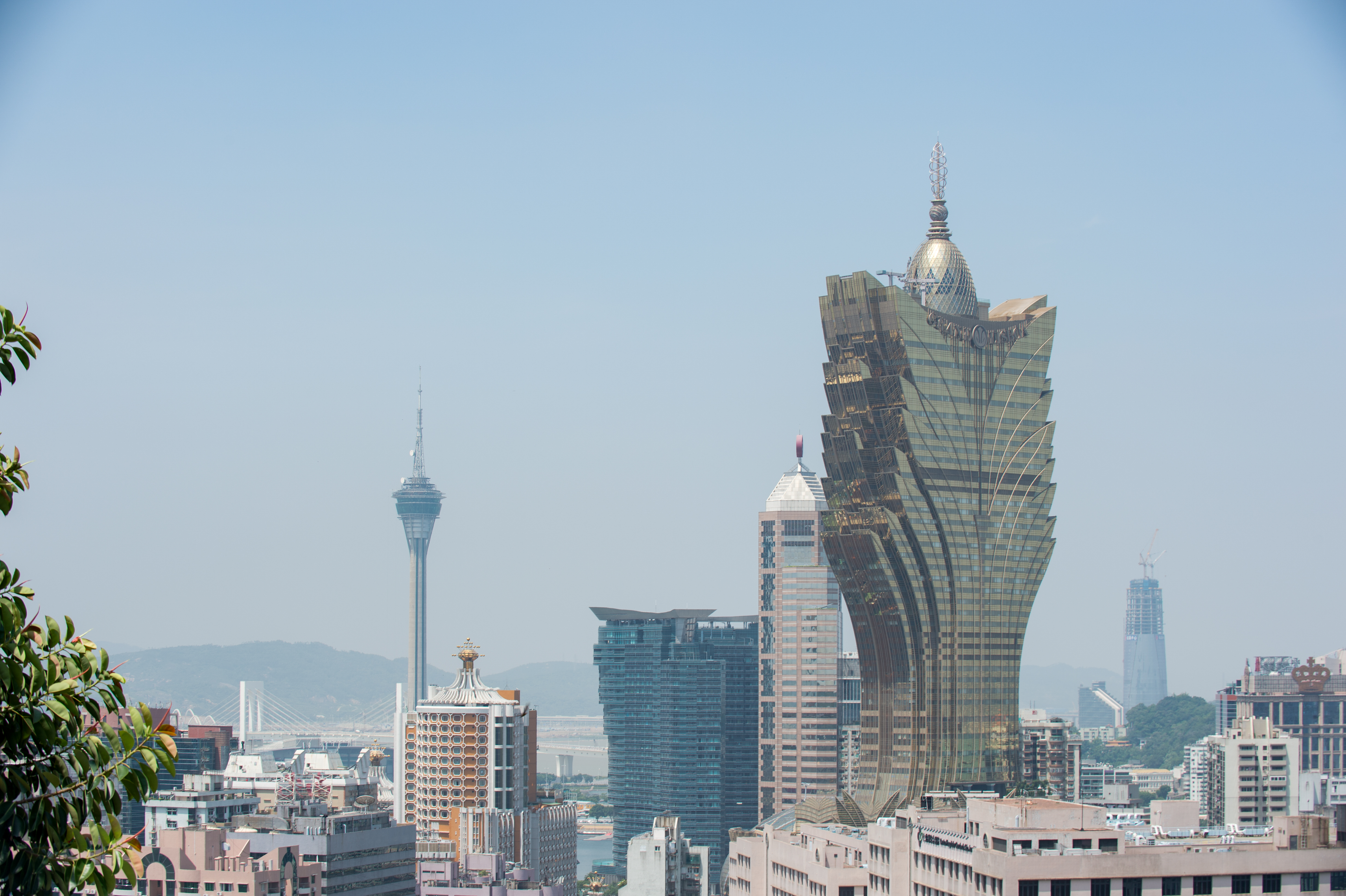 마카오 도심의 모습